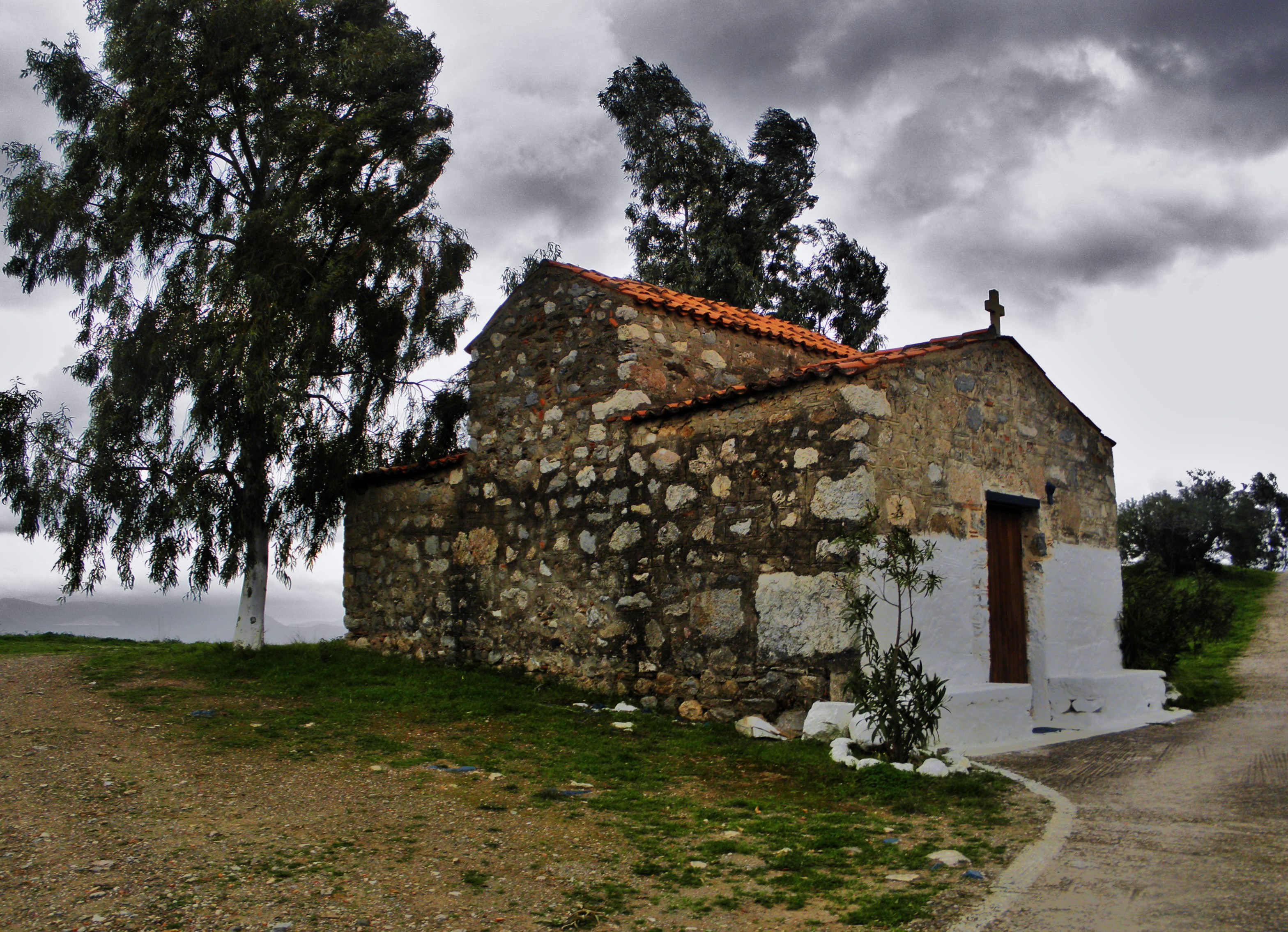 Ναός Μεταμόρφωση Σωτήρος Αμαρύνθου«Ναός Μεταμόρφωση Σωτήρος Αμαρύνθου»